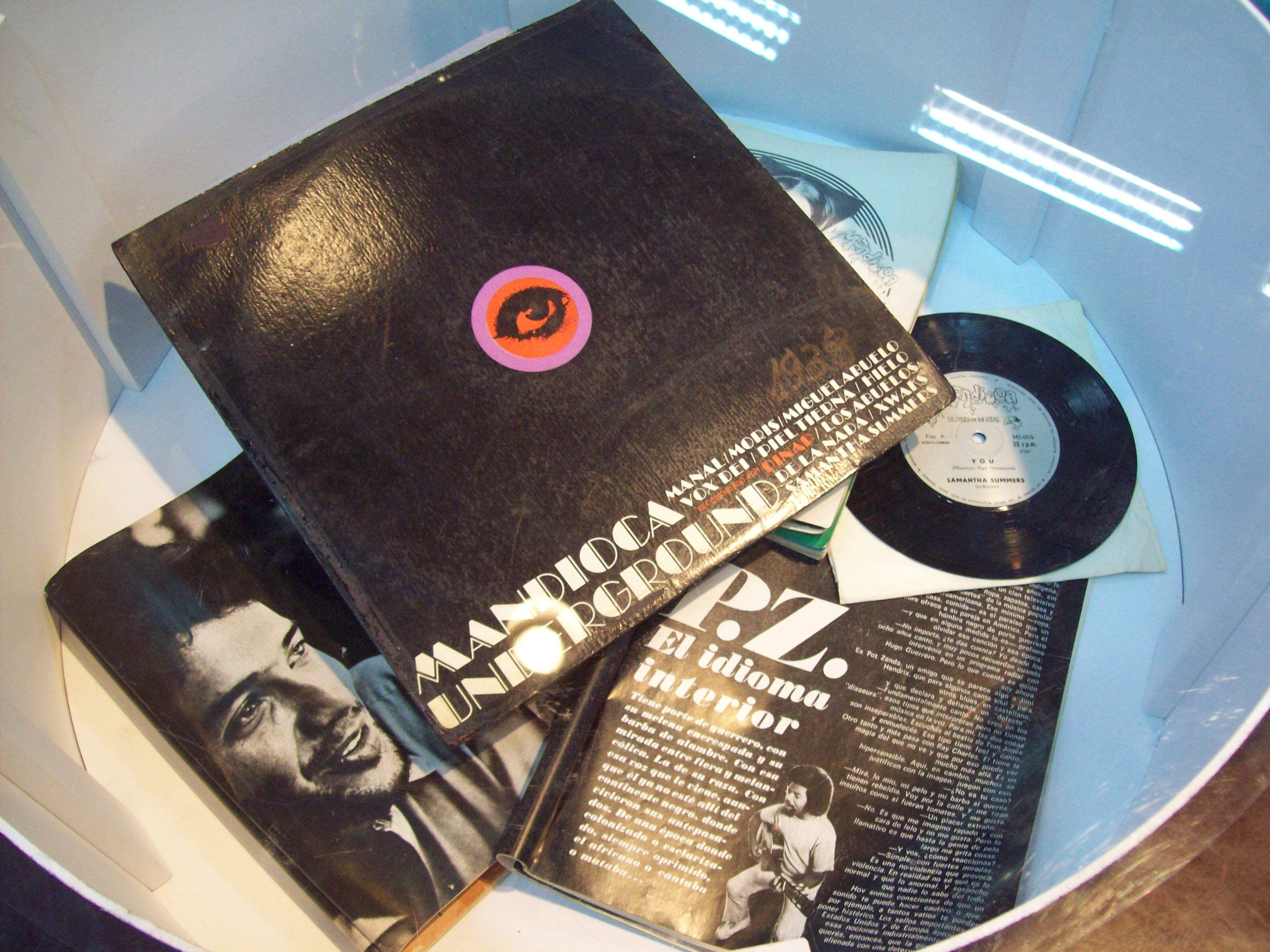 Discos de vinilo del sello Mandioca, entre ellos el compilatorio Mandioca Underground, en la muestra de la Biblioteca Nacioal Pidamos peras a Jorge Álvarez.